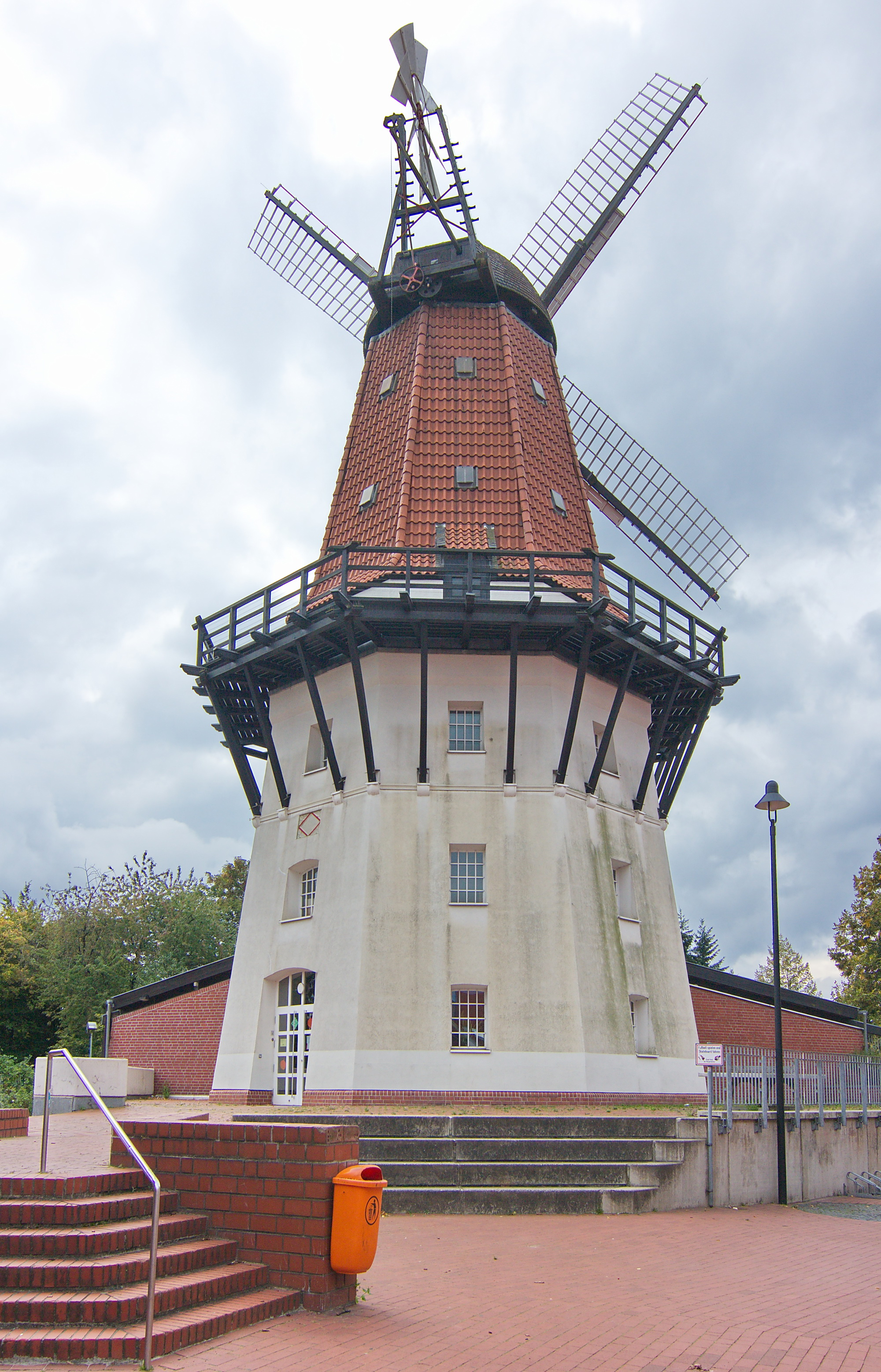 Töpfers Mühle am historischen Standort der Ratsmühle aus dem 14. Jahrhundert, wurde 1945 bei einer Explosion beschädigt. Als Ersatz des Peiner Wahrzeichens kaufte man eine Mühle gleichen Typs von der Insel Bornholm. In der Mühle befindet sich seit 1985 ein Jugendfreizeitzentrum.